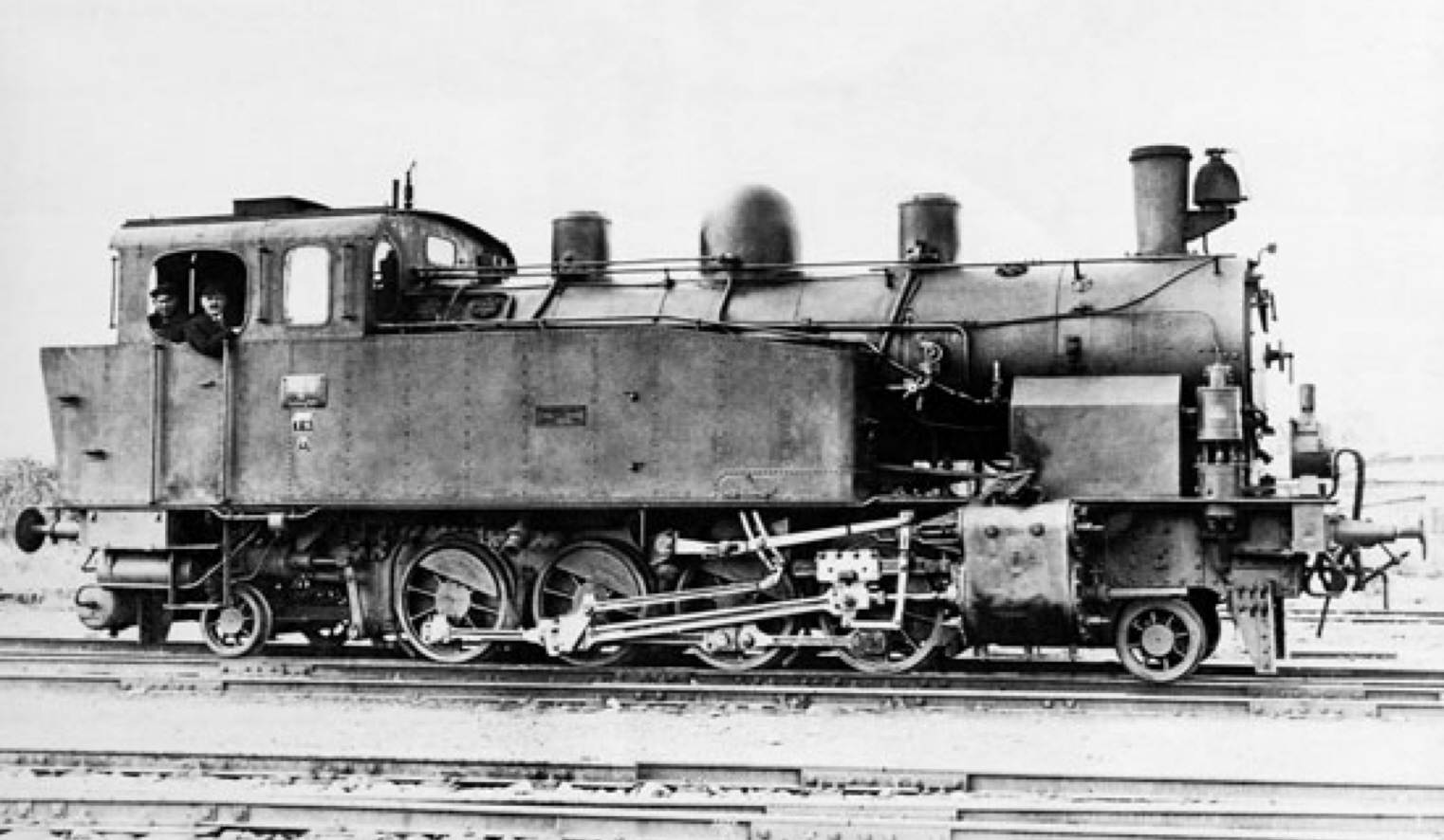 1'D 1' h2t-Dampflokomotive, 1915 bei Henschel für die meterspurige Nordhausen-Wernigeroder Eisenbahn-Gesellschaft gebaut (Nr. 42); 1917 von der Lübeck-Büchener Eisenbahn übernommen und auf Regelspur umgespurt (vorgesehene Nr. 152), anschließend jedoch von der Fa. Erich am Ende angekauft und 1919 an die Kleinbahn Lüneburg–Soltau weiterveräußert (Nr. 8); ab 1944 als 92 141 bei den Osthannoverschen Eisenbahnen; 1961 ausgemustert